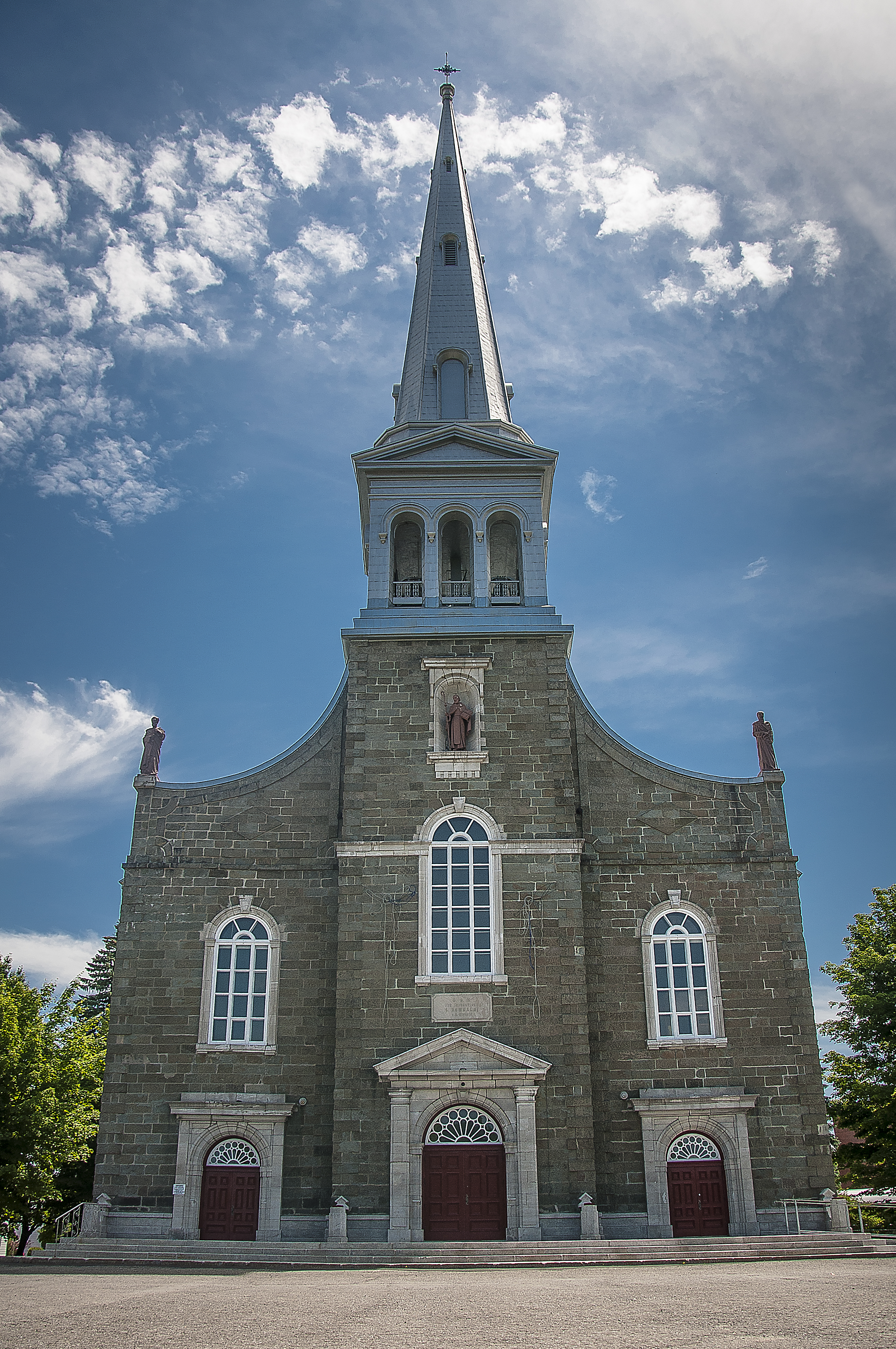 Paroisse de la ville de St-Romuald (maintenant arrondissement Les Chutes-de-la-Chaudière-Est de la ville de Lévis)